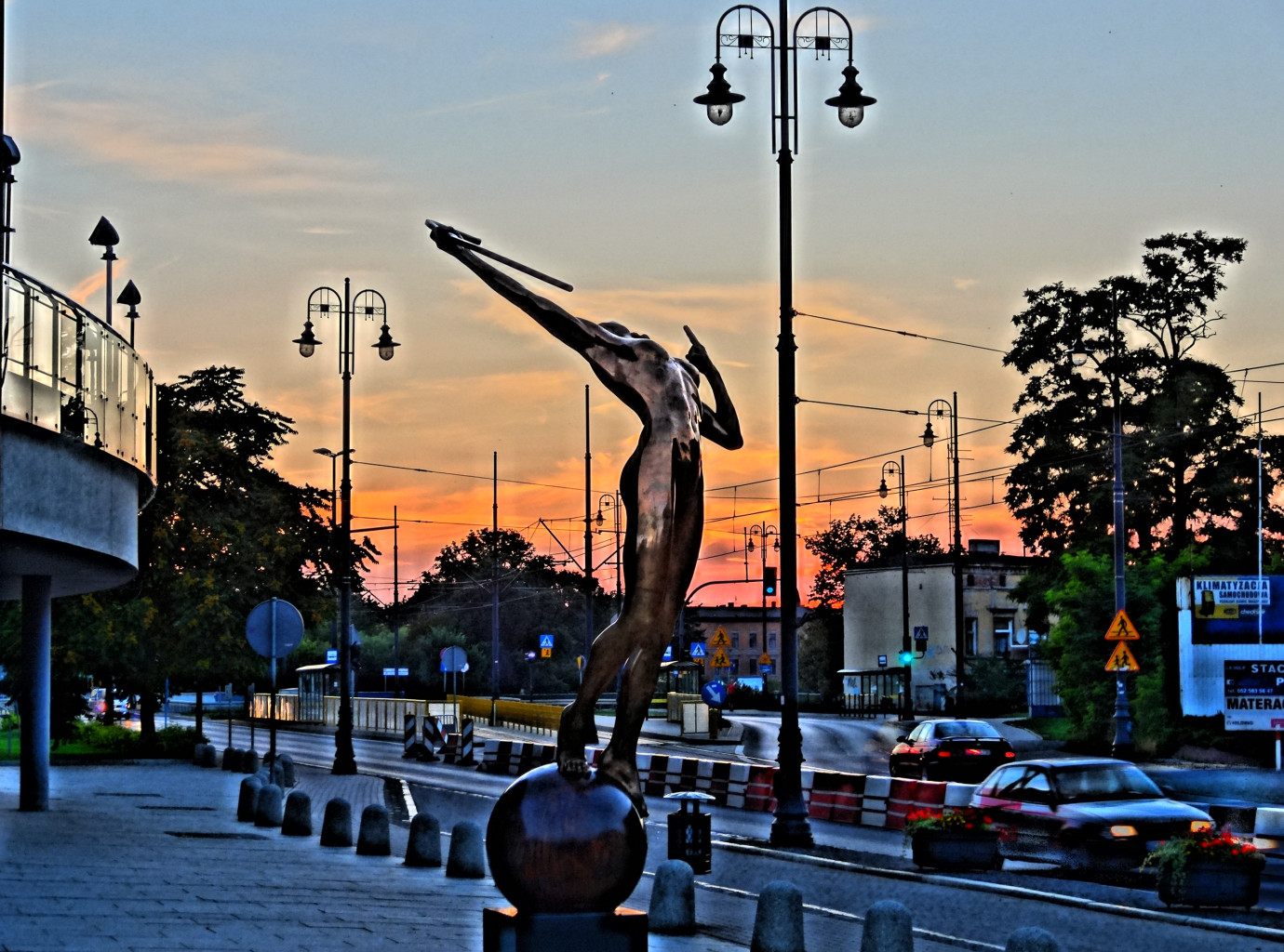 Rzeźba Łuczniczka Nova ustawiona przed Operą Nova w Bydgoszczy w 2013 roku